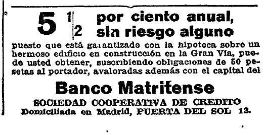 Annuncio pubblicitario per sottoscrizione obbligazioni del Banco Matritense garantite dall'ipoteca sul costruendo edificio nella Gran Via di Madrid (attuale numero 22 hotel de la Reina) e dal capitale del Banco stesso